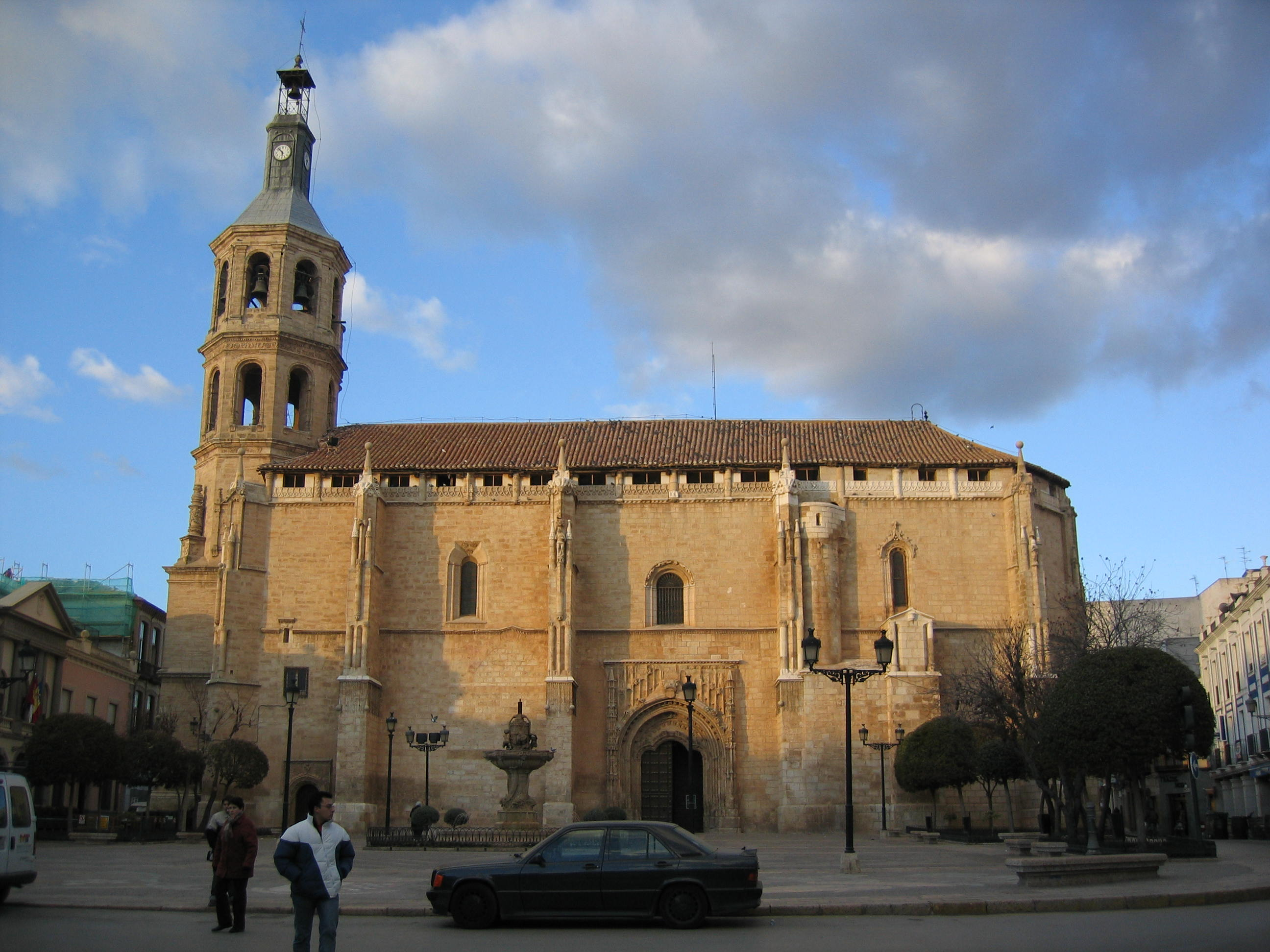 Iglesia de Nuestra Señora de la Asunción, en Valdepeñas (España)